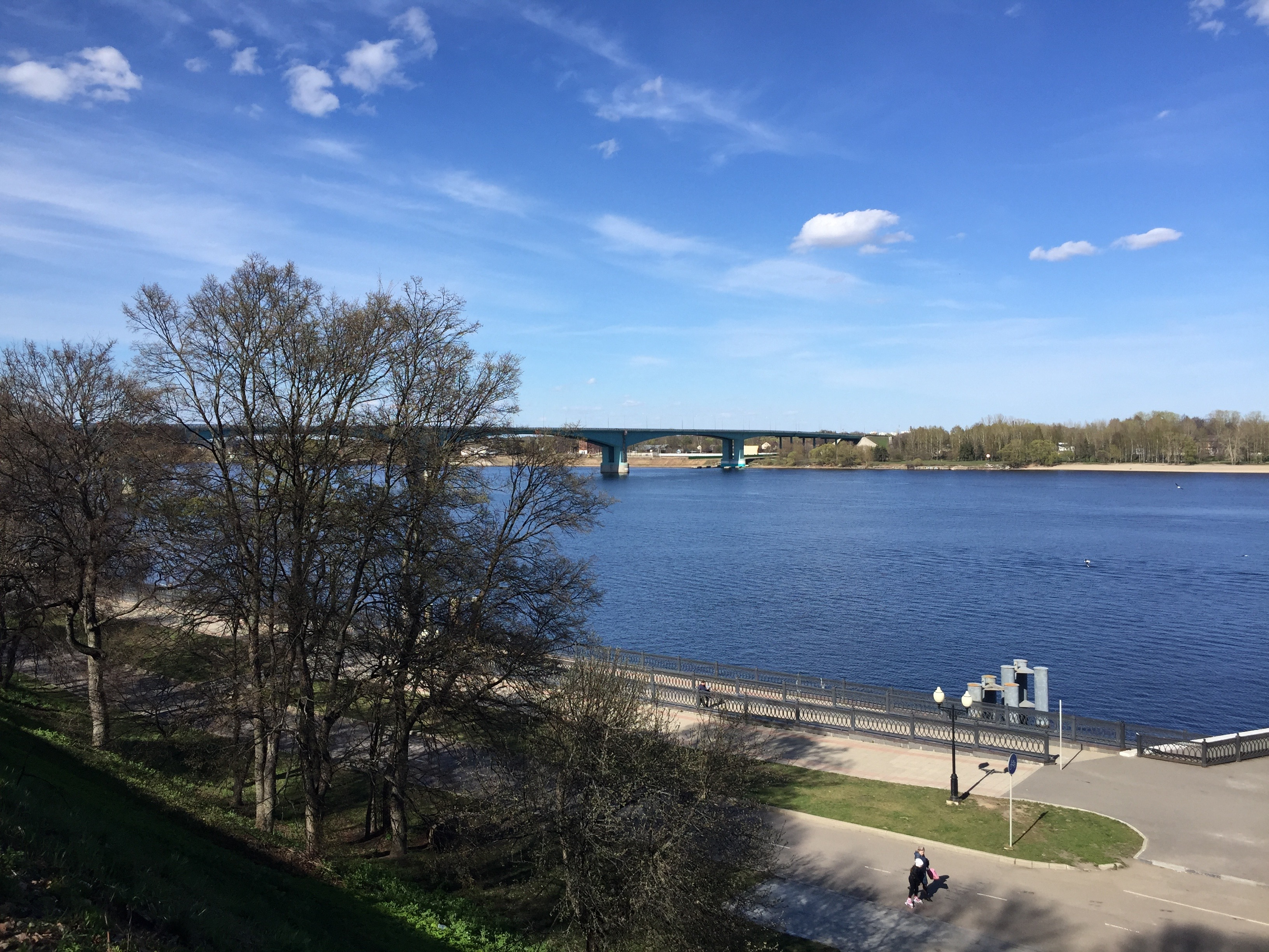 Набережная Волги (2019)